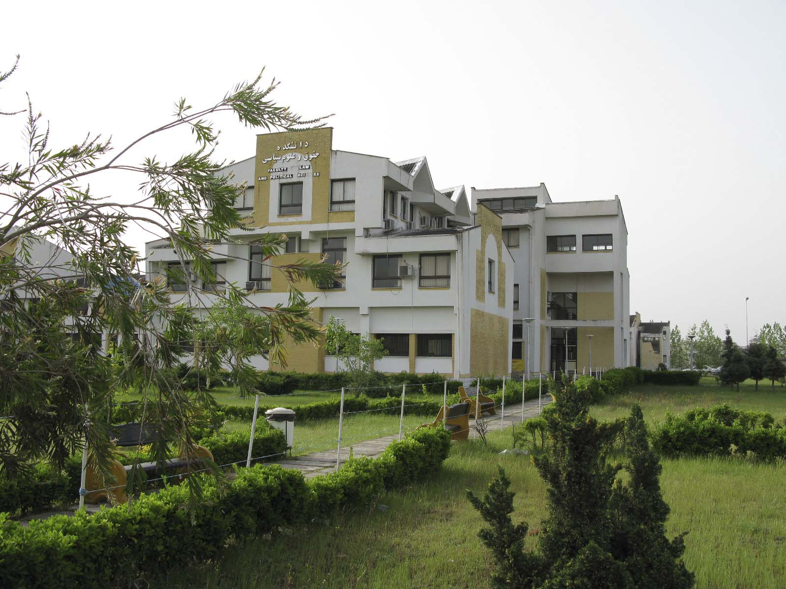 دانشکده حقوق و علوم سیاسی دانشگاه مازندران